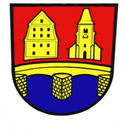 Wappen der Gemeinde Großweitzschen, LK Mittelsachsen, Bundesland Sachsen